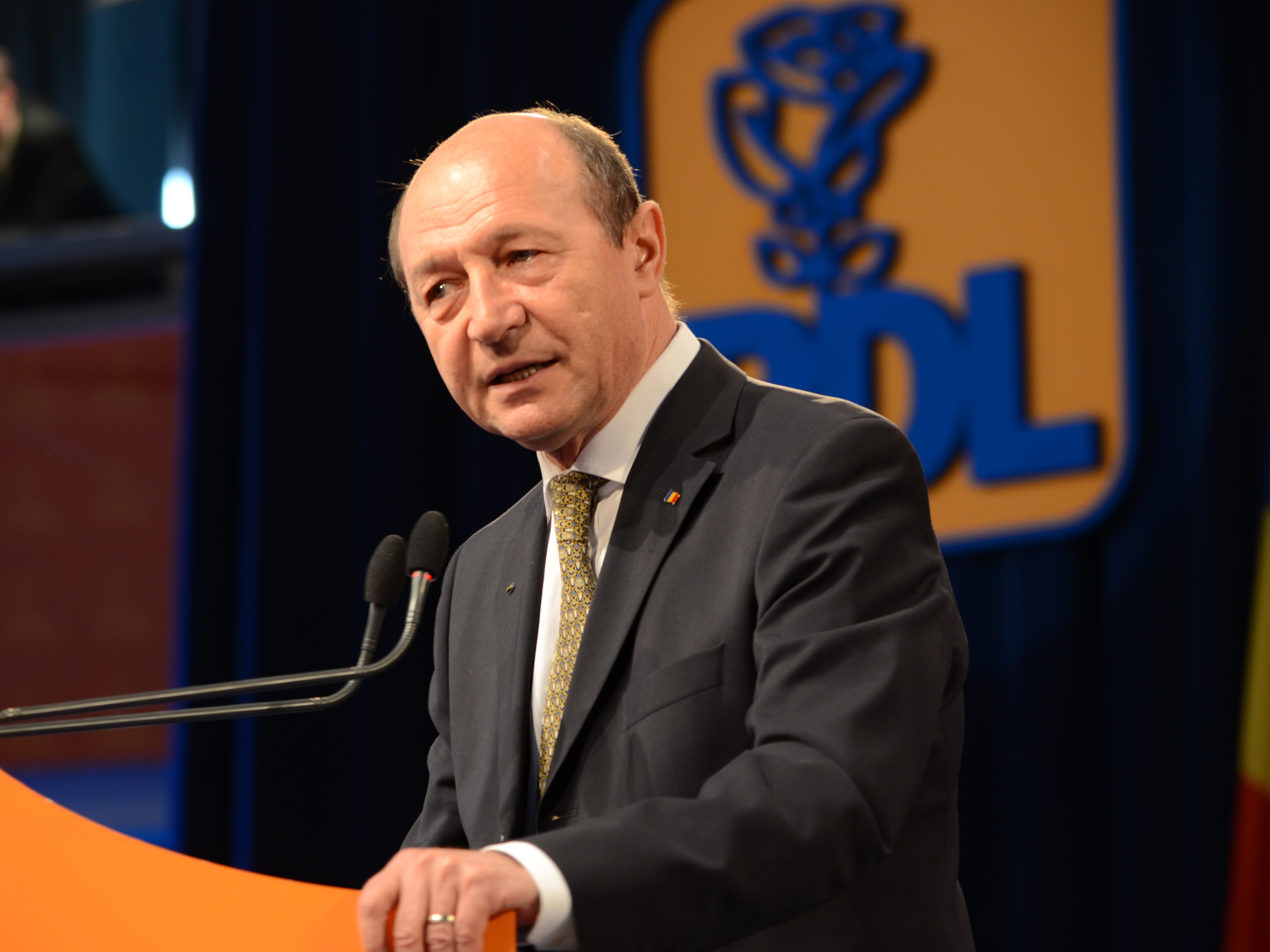 Traian Băsescu (la Convenția națională extraordinară a Partidului Democrat-Liberal, 23 martie 2013)